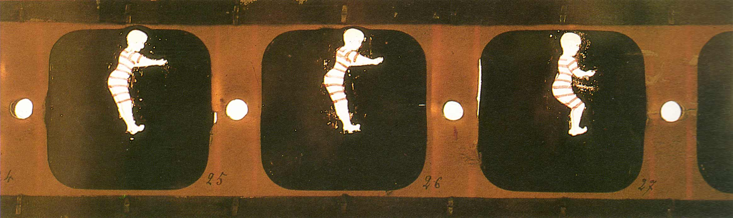 Fotografia della pellicola utilizzata da E.Reynaud per il suo Théatre Optique (Autur d'una cabine - 1894)